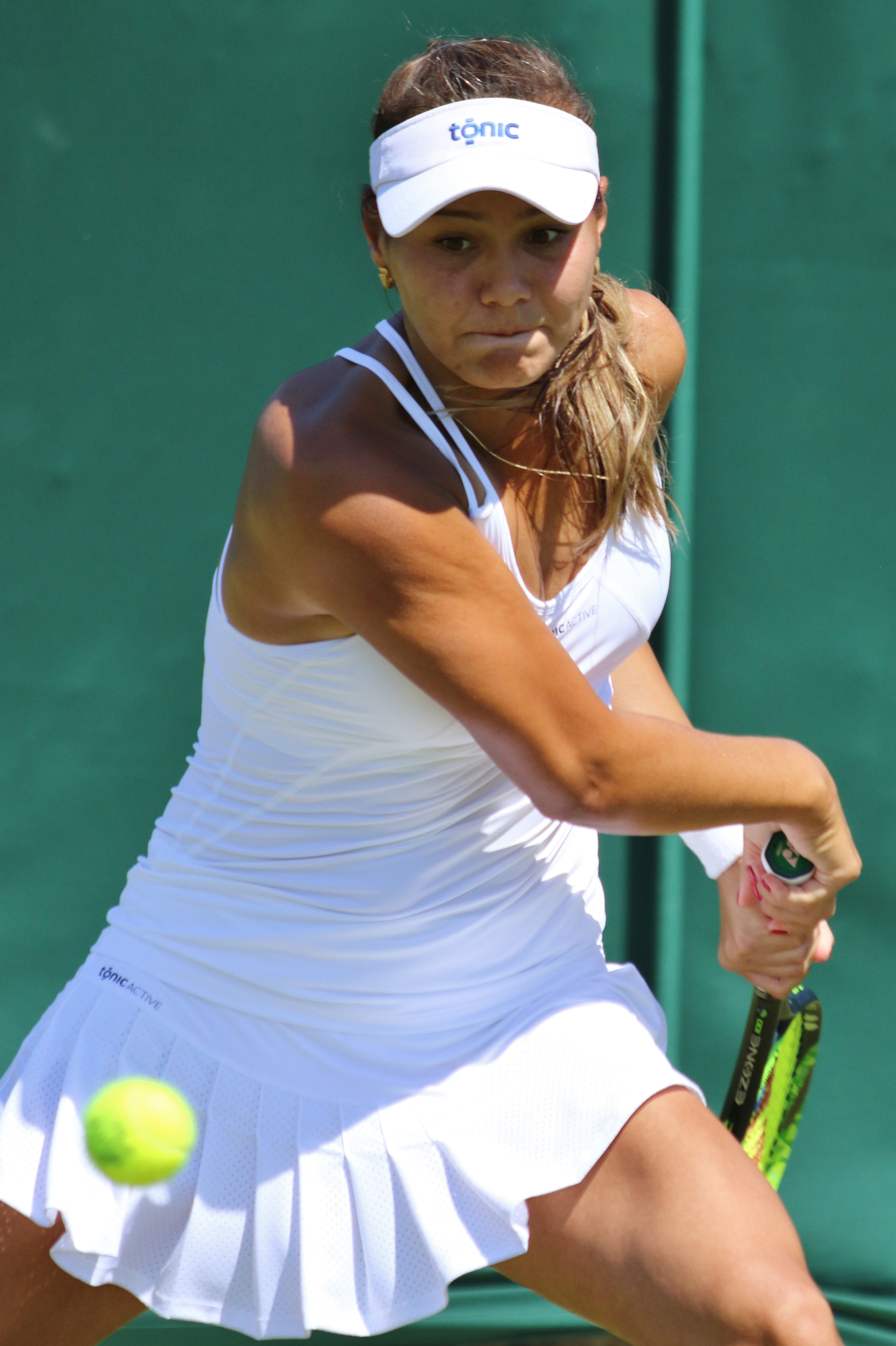 Sharipova WMQ18 (8)